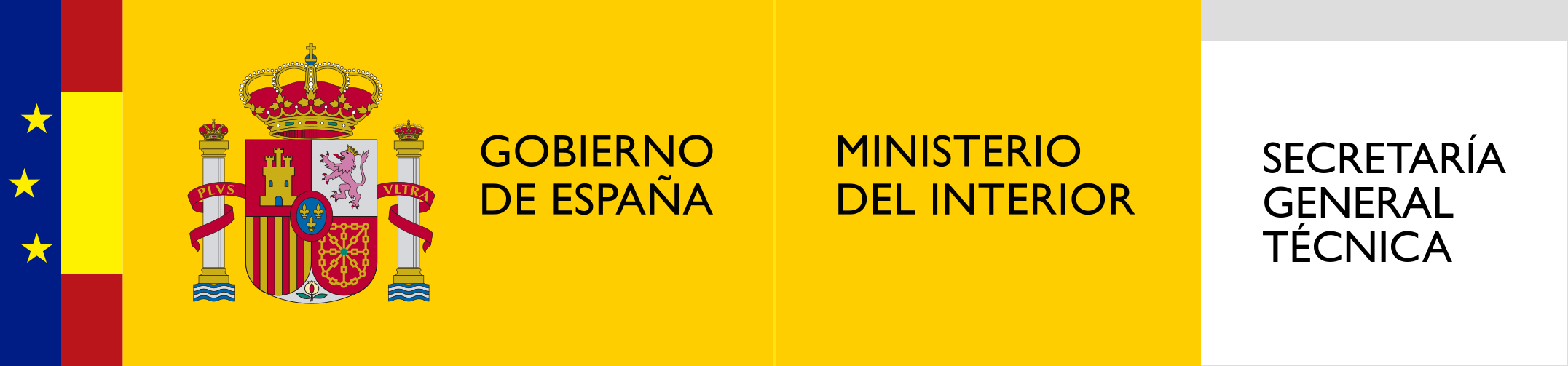 Logotipo de la Secretaría General Técnica del Ministerio de Interior de España